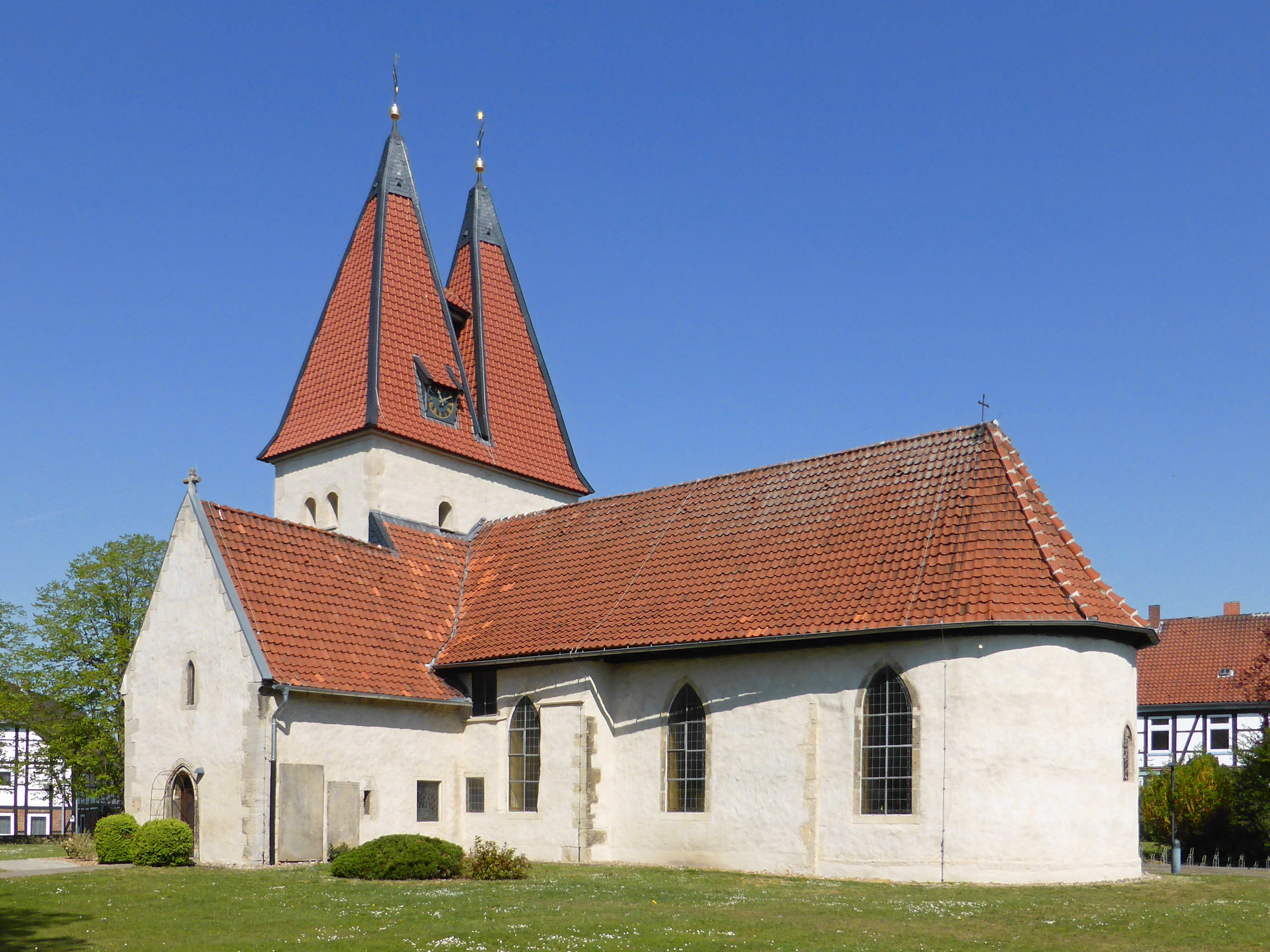 Evangelische Kirche "Zum Heiligen Kreuz" in Lehre.